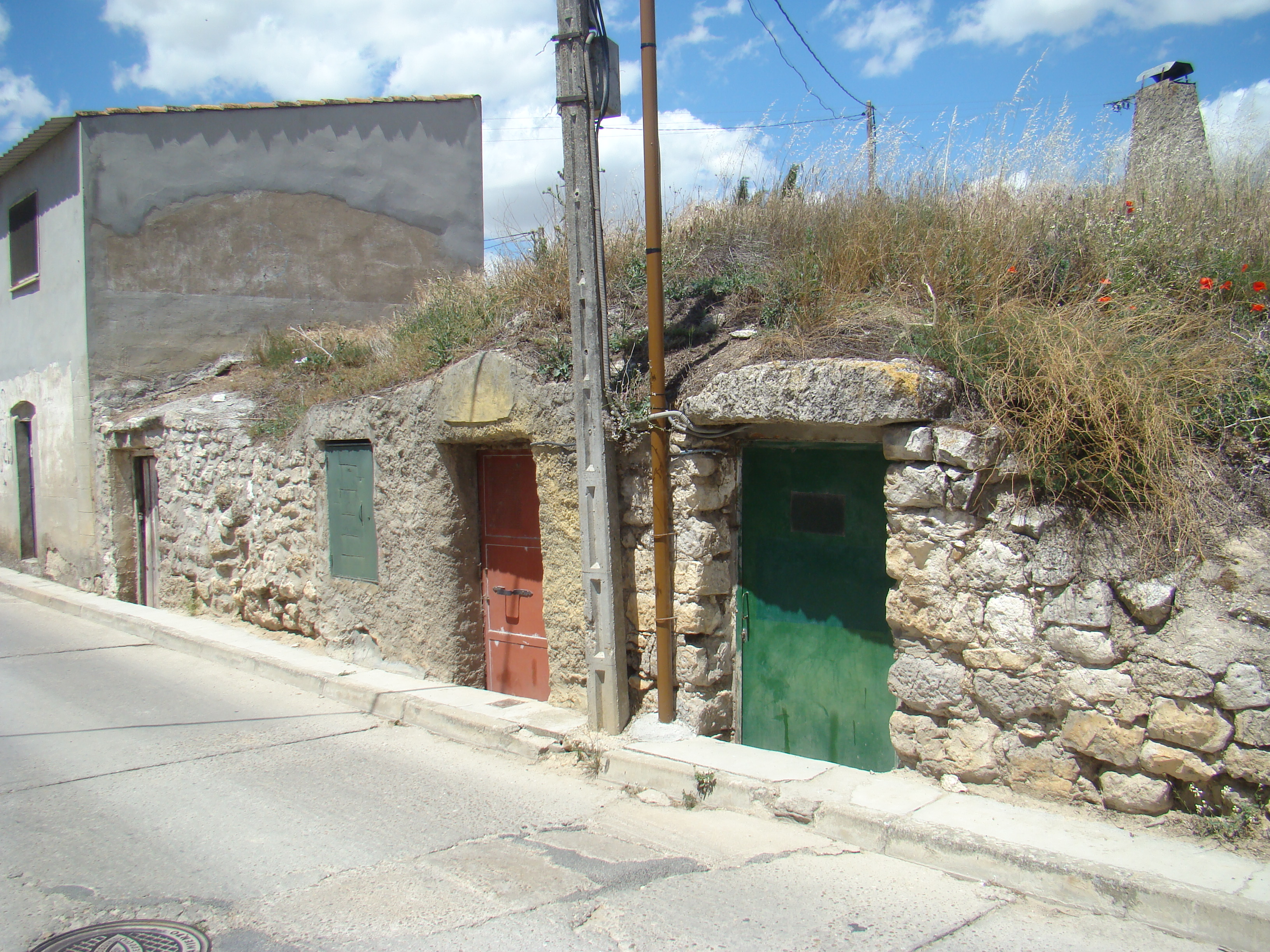 Vivienda-cueva en las gravas norte, Ronda del Obispo, en la ciudad de Cigales (Valladolid, España). Estas cuevas excavadas estuvieron habitadas hasta bien entrado el siglo XX y algunas se usan todavía como segunda casa de verano.